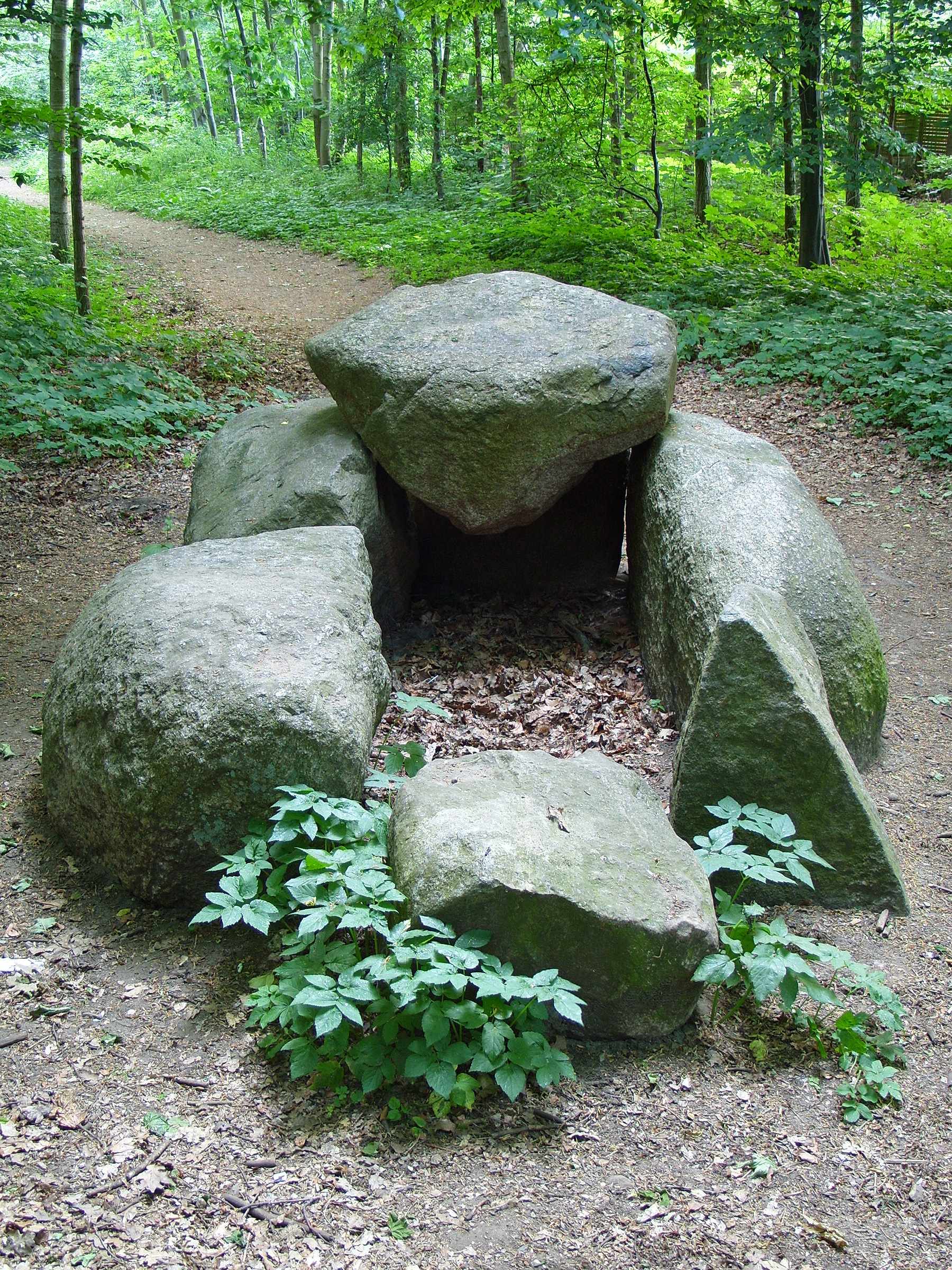 Der Urdolmen von Büdelsdorf, bearbeitet, von vorn